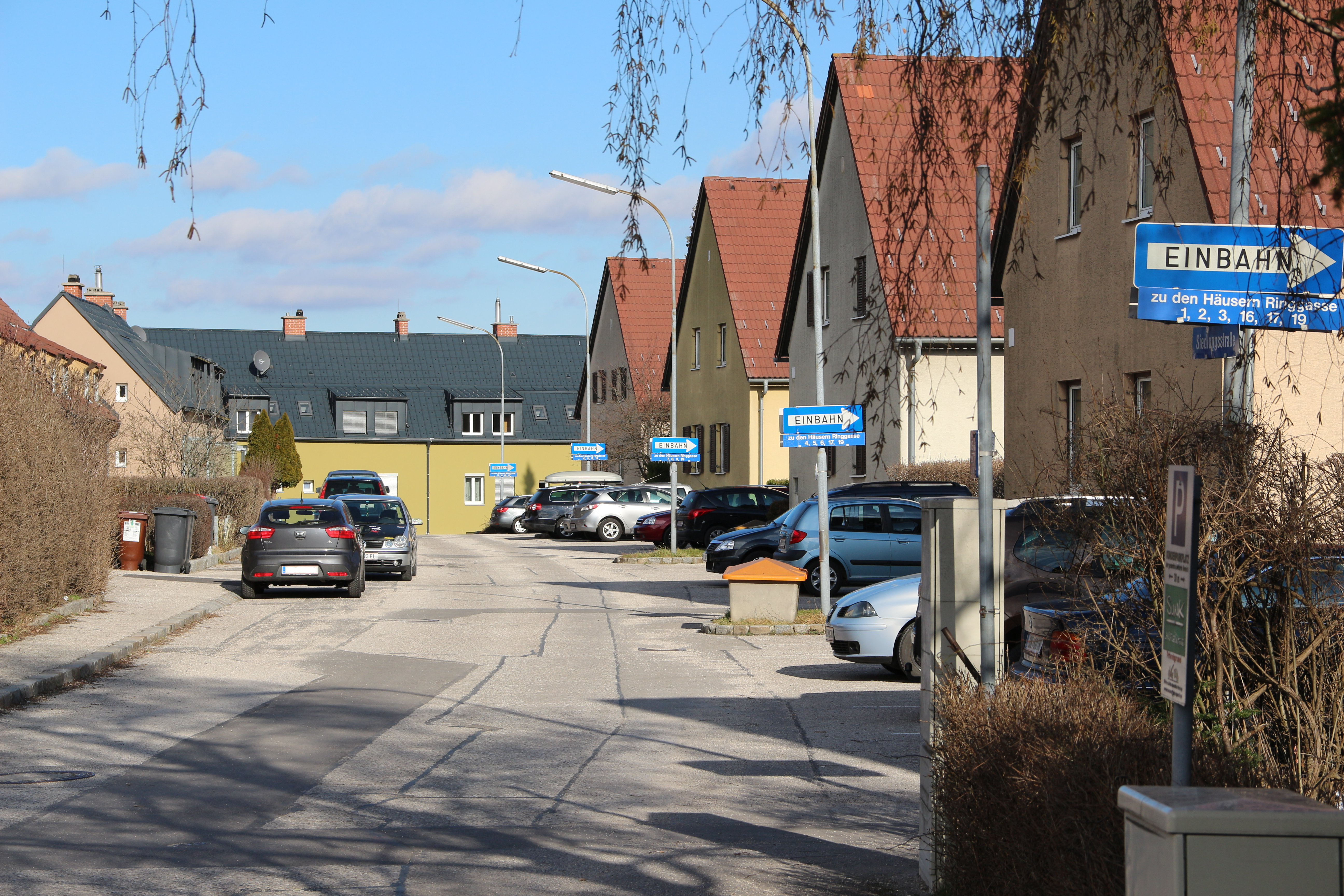 Einbahnstrassen in Enzesfeld-Lindabrunn. Die jeweiligen Schilder beschreiben kurze Straßen von maximal 60 Metern Länge in einer Siedlung oberhalb des Dorfzentrums.